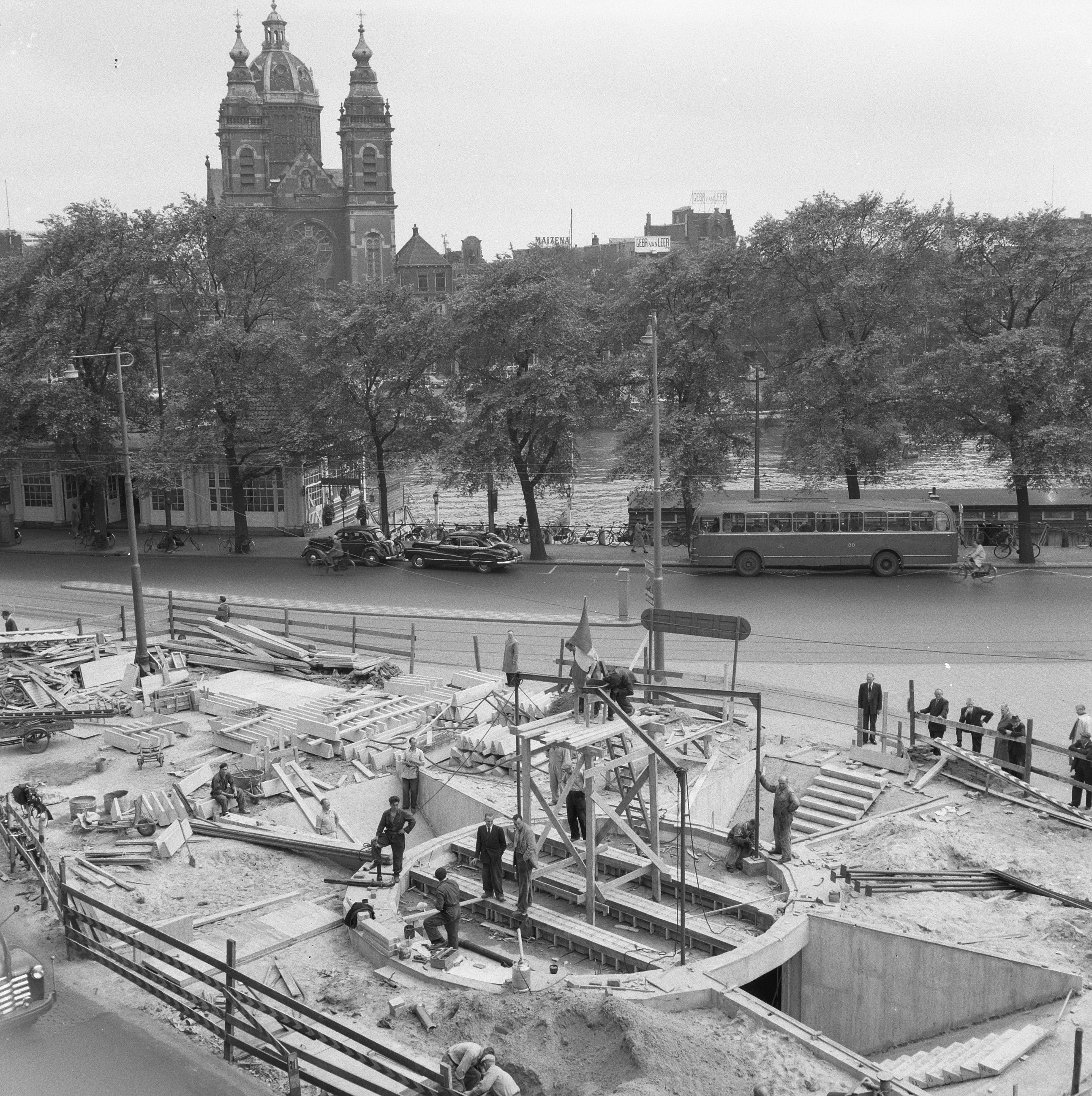 Collectie / Archief : Fotocollectie Anefo Reportage / Serie : [ onbekend ] Beschrijving : Bouw voetgangerstunnel voor Centraal Station Amsterdam Datum : 23 juni 1955 Locatie : Amsterdam, Noord-Holland Trefwoorden : bouw, tunnels, voetgangers Fotograaf : Behrens, Herbert / Anefo Auteursrechthebbende : Nationaal Archief Materiaalsoort : Negatief (zwart/wit) Nummer archiefinventaris : bekijk toegang 2.24.01.03 Bestanddeelnummer : 934-5662